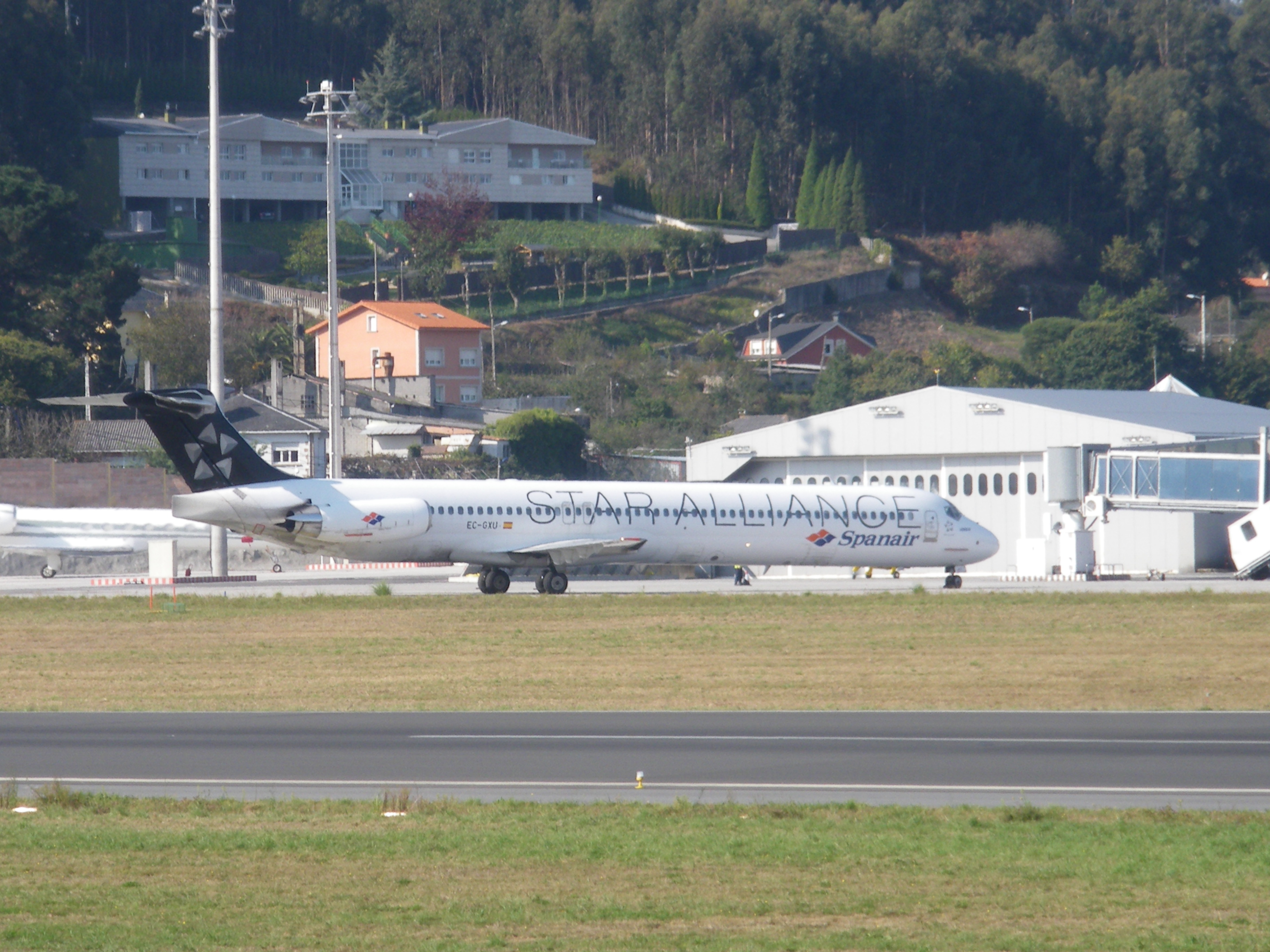 Un MD-83 de Spanair a punto de quedar estacionado en el aerpuerto coruñés de Alvedro.